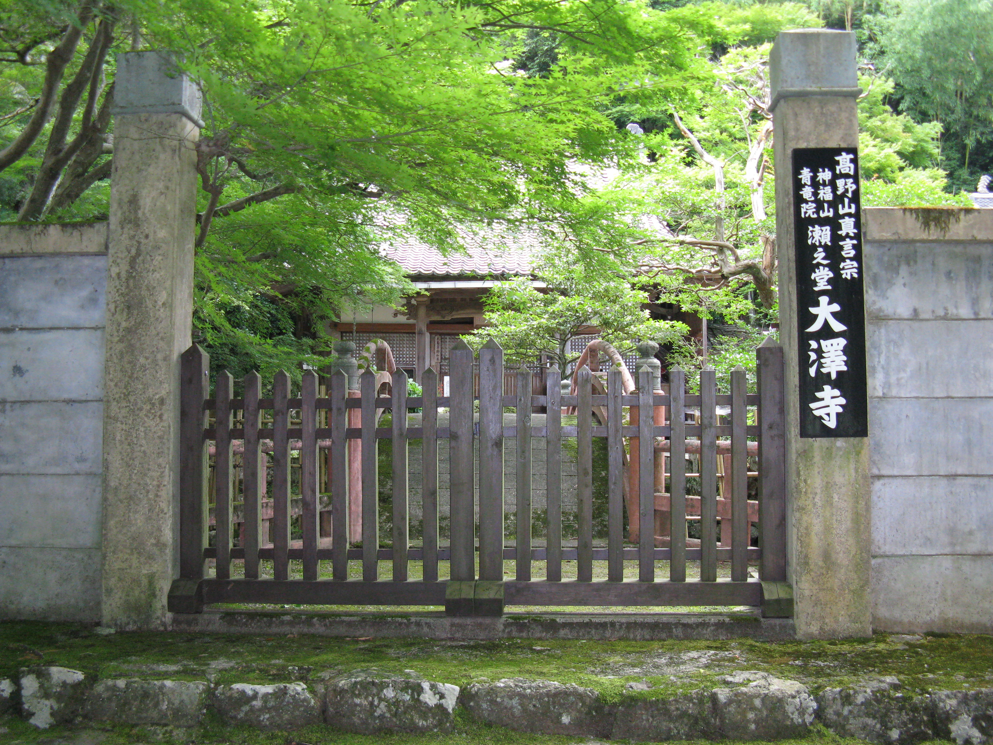 大澤寺（大沢寺）